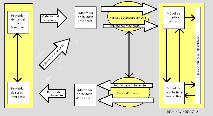 Diagrama de blocs d'interacció del DVB-RCT